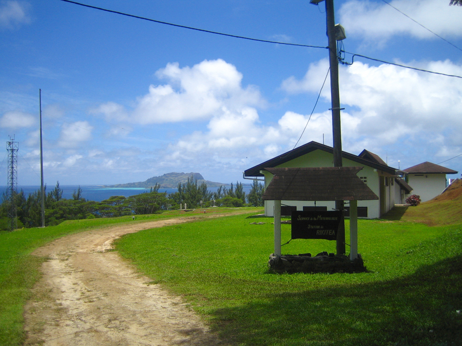 Photo station météorologique Météo-France de Rikitea (Photo personnel 2006) Utilisateur:FRED